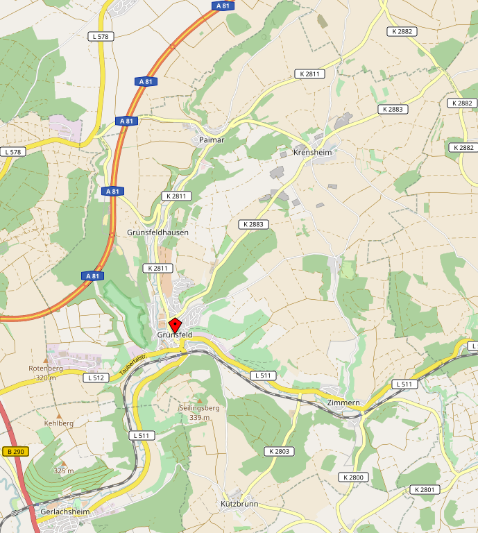 Lage Grünsfeld Stadtteile